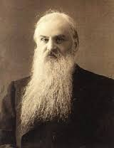 Retrat de Feodor Eduardovitx Molin (Фёдор Эдуардович Молин, 1861-1941), matemàtic rus